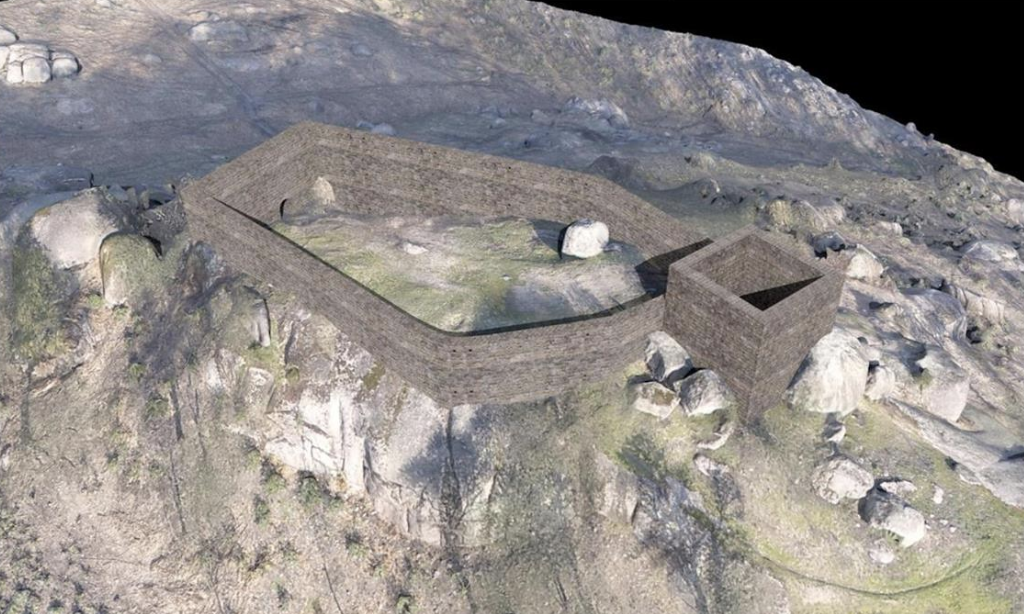 Montagem gerada por computador do provável aspeto do Castelo de Vermoim